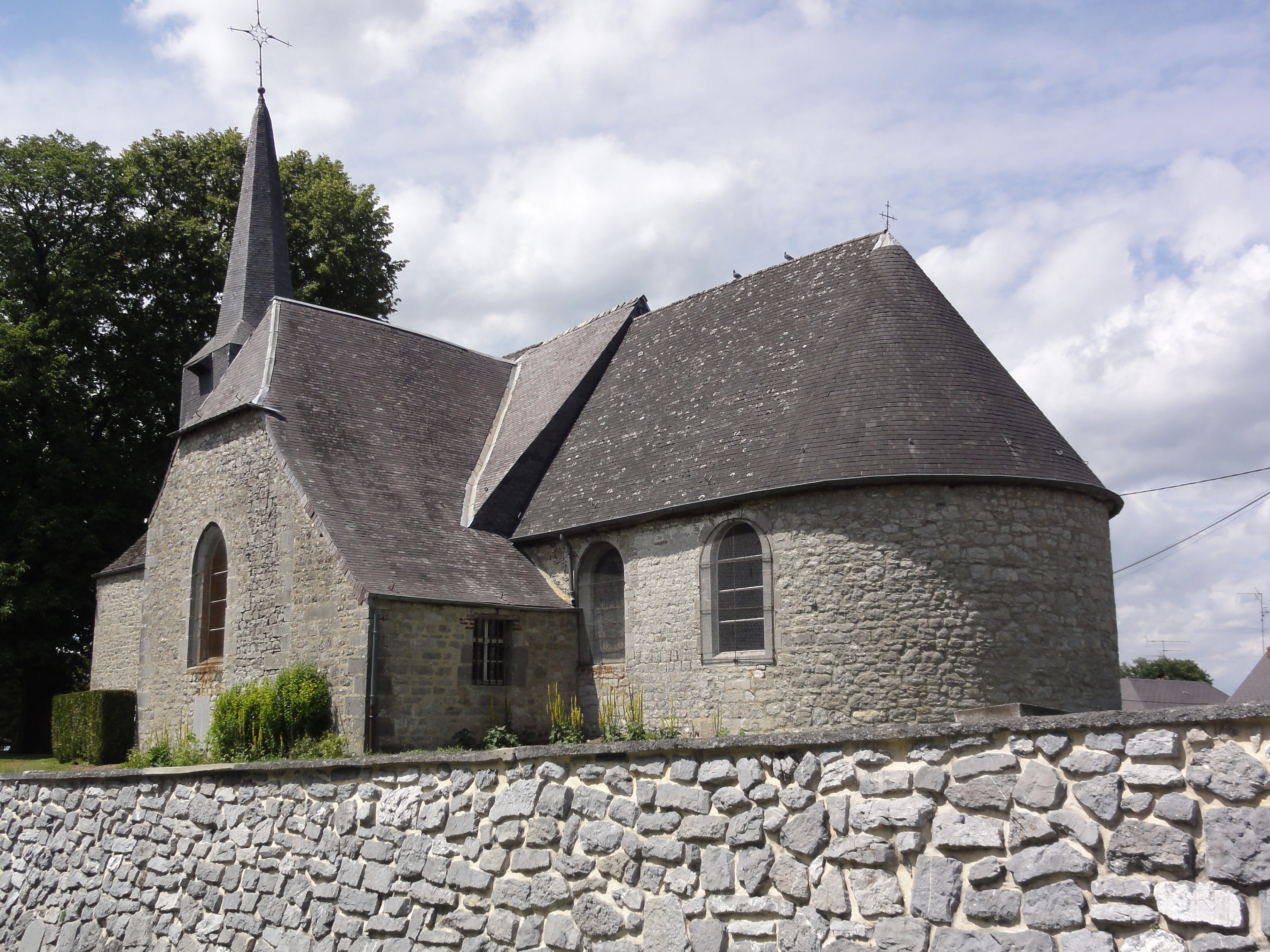 Baives (Nord, Fr) église, chevetIA59000981 .